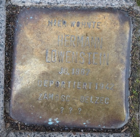 Stolperstein in Soest Jakobistraße 21, Hermann Löwenstein